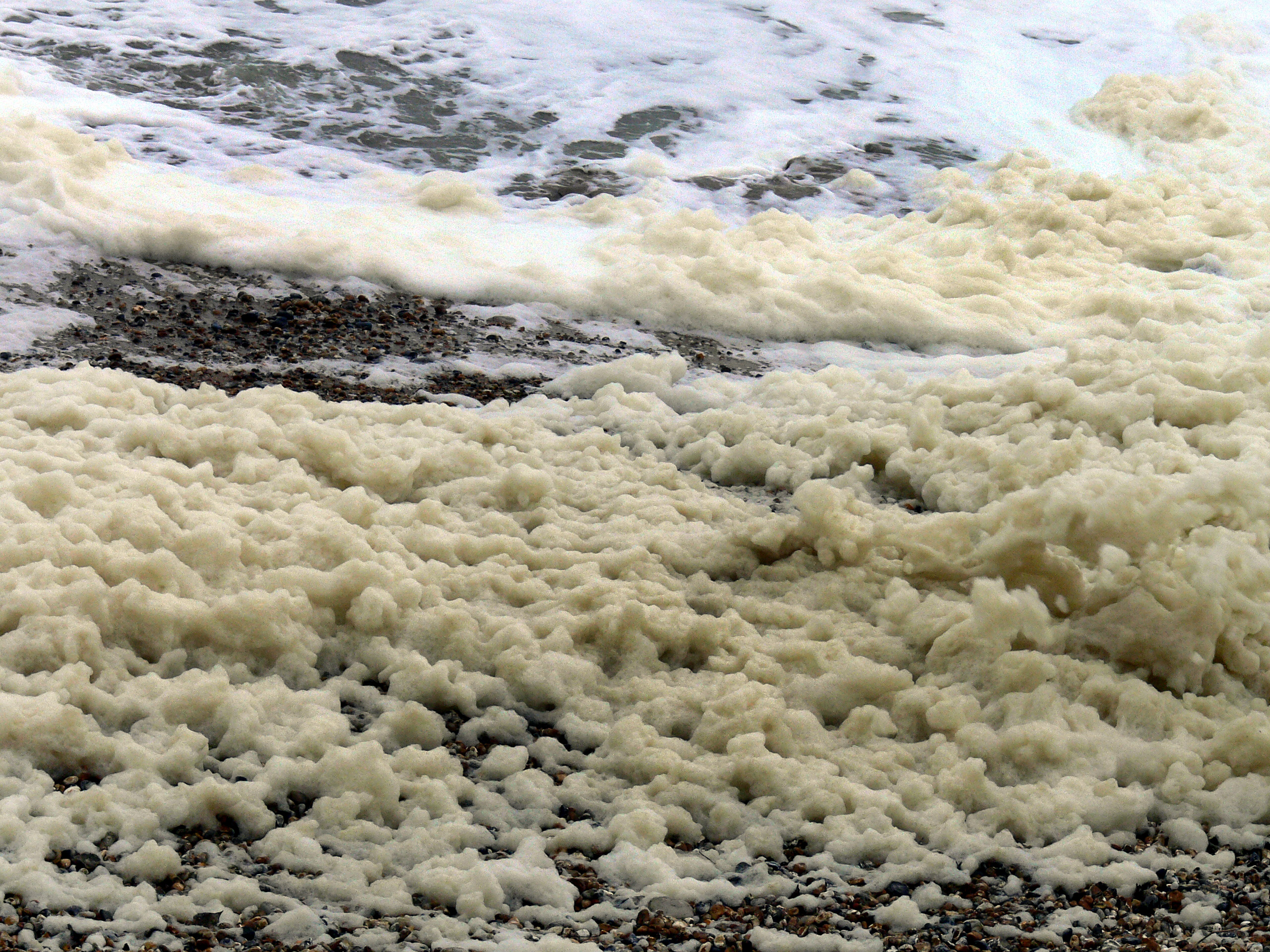 bloom algual (efflorescence) de Phaeocystis Lieu : Fort mahon, à Ambleteuse sur le littoral du Pas-deCalais, en Région Nord-Pas-de-Calais